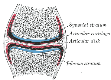 Synovial joint.